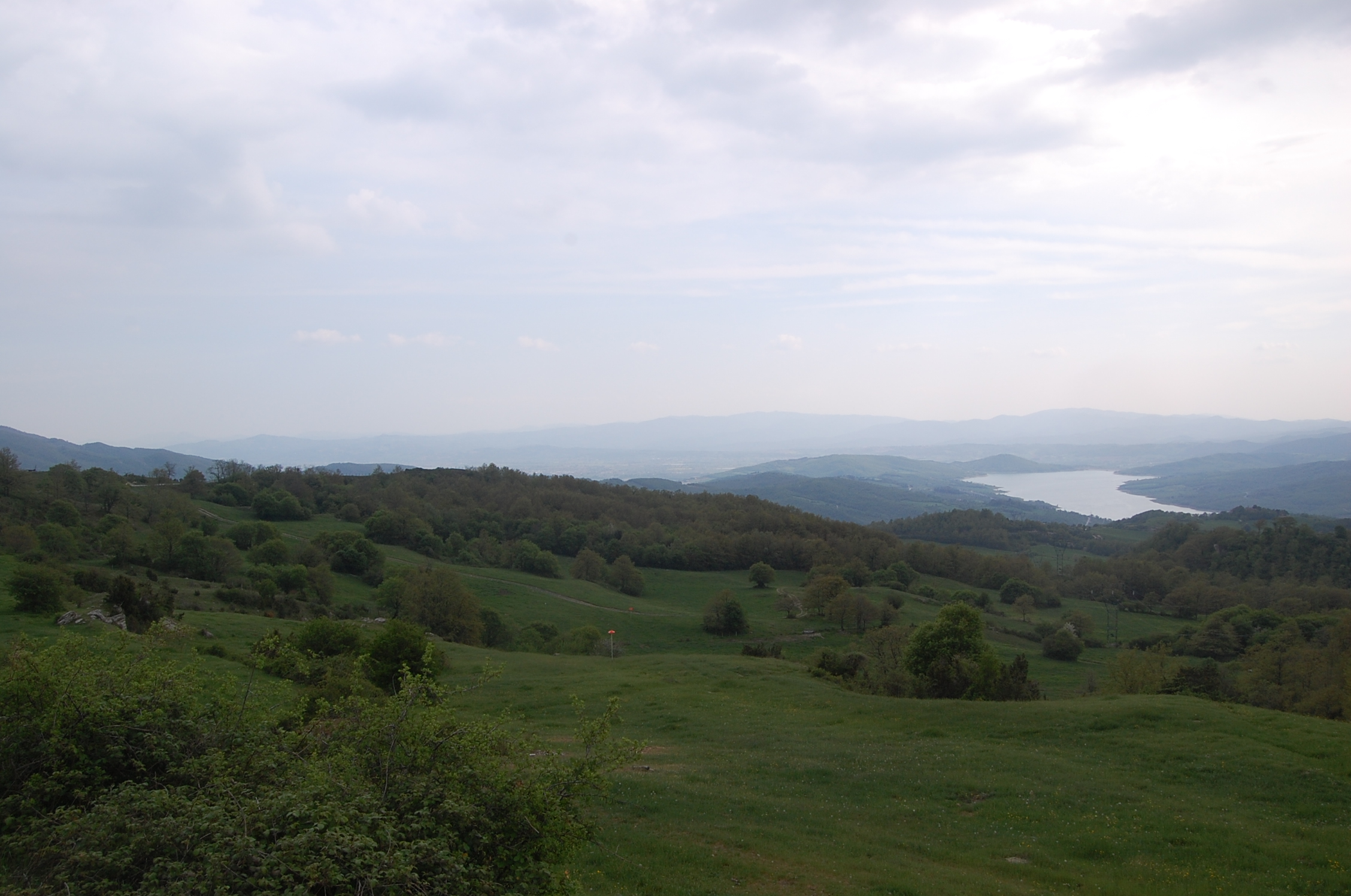 Panorama dalle curve del valico di Viamaggio